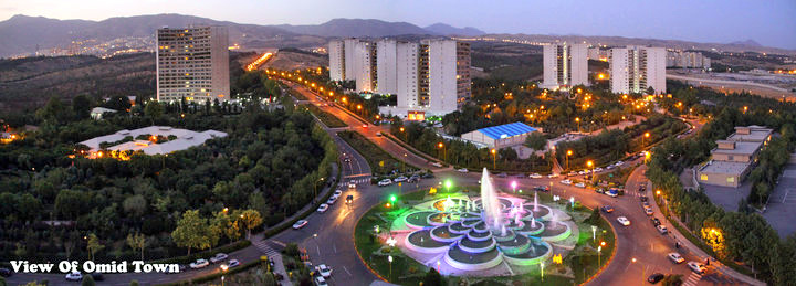 شهرک امید ، تهران ، نمای شمالی عکس از داود ملک حسینی